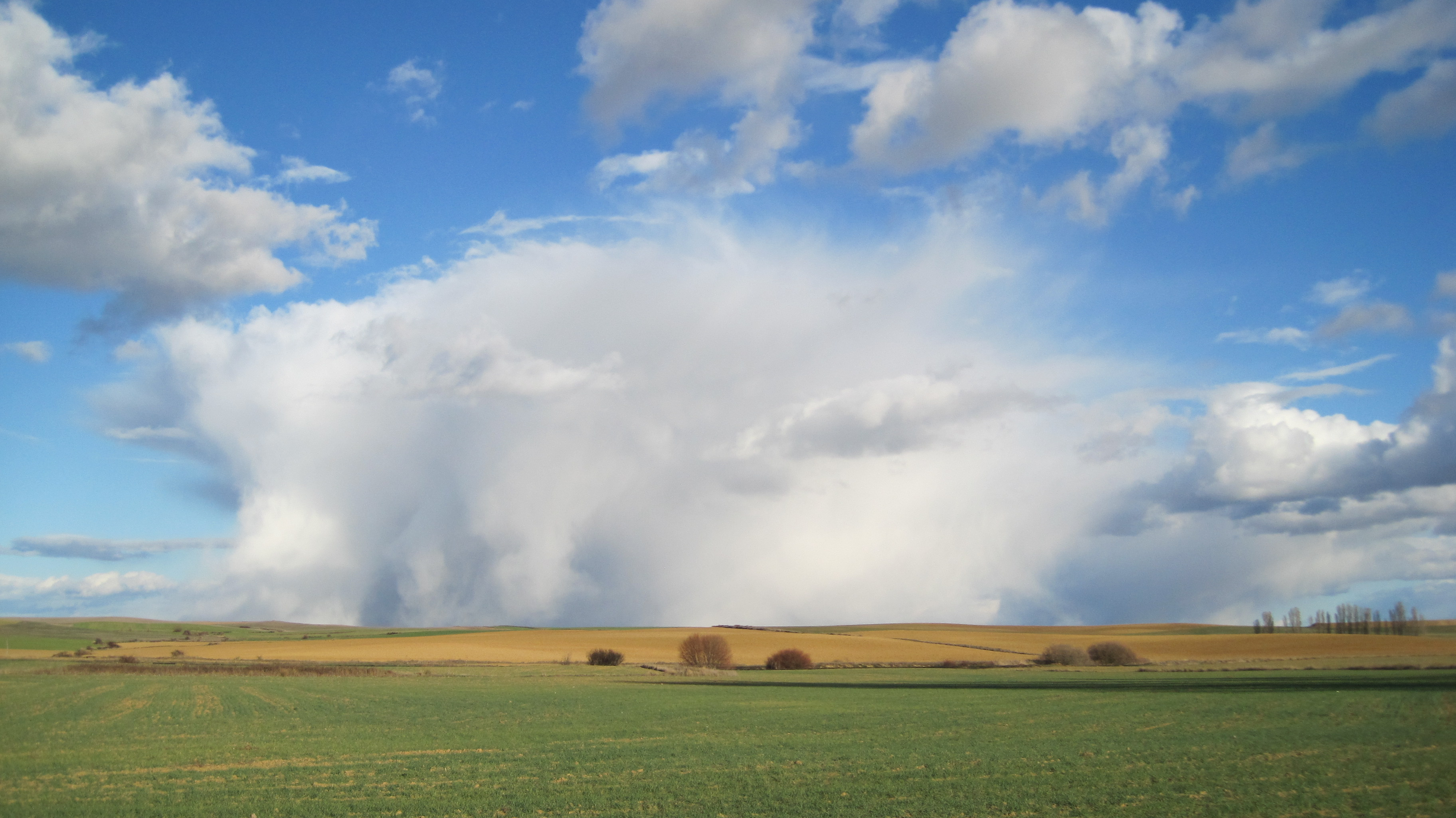 Nube de tipo cumulonimbus desde San Román de la Cuba (Palencia, España).